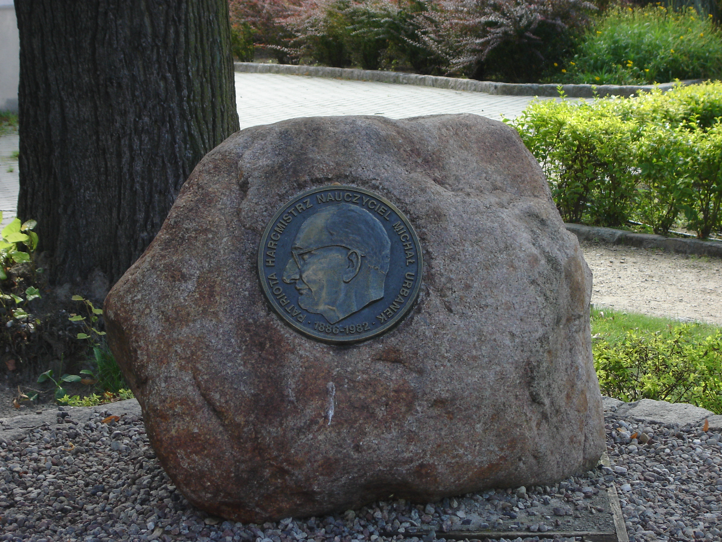 Pomnik "Patriota-Harcmistrz-Nauczyciel - Michał Urbanek" w Sopocie, skwer Michała Urbanka.